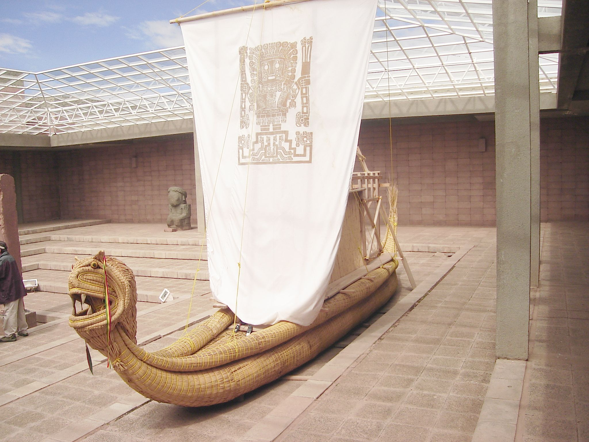 Foto tirada por mim, em Tiwanaku.